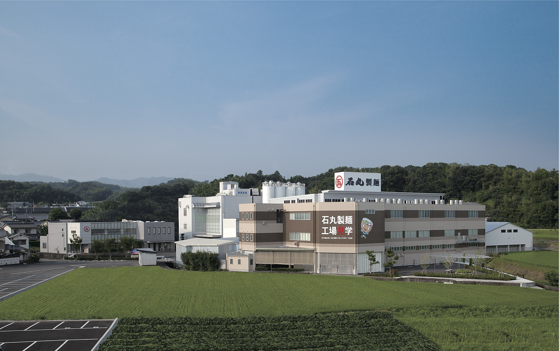 石丸製麺株式会社全景写真